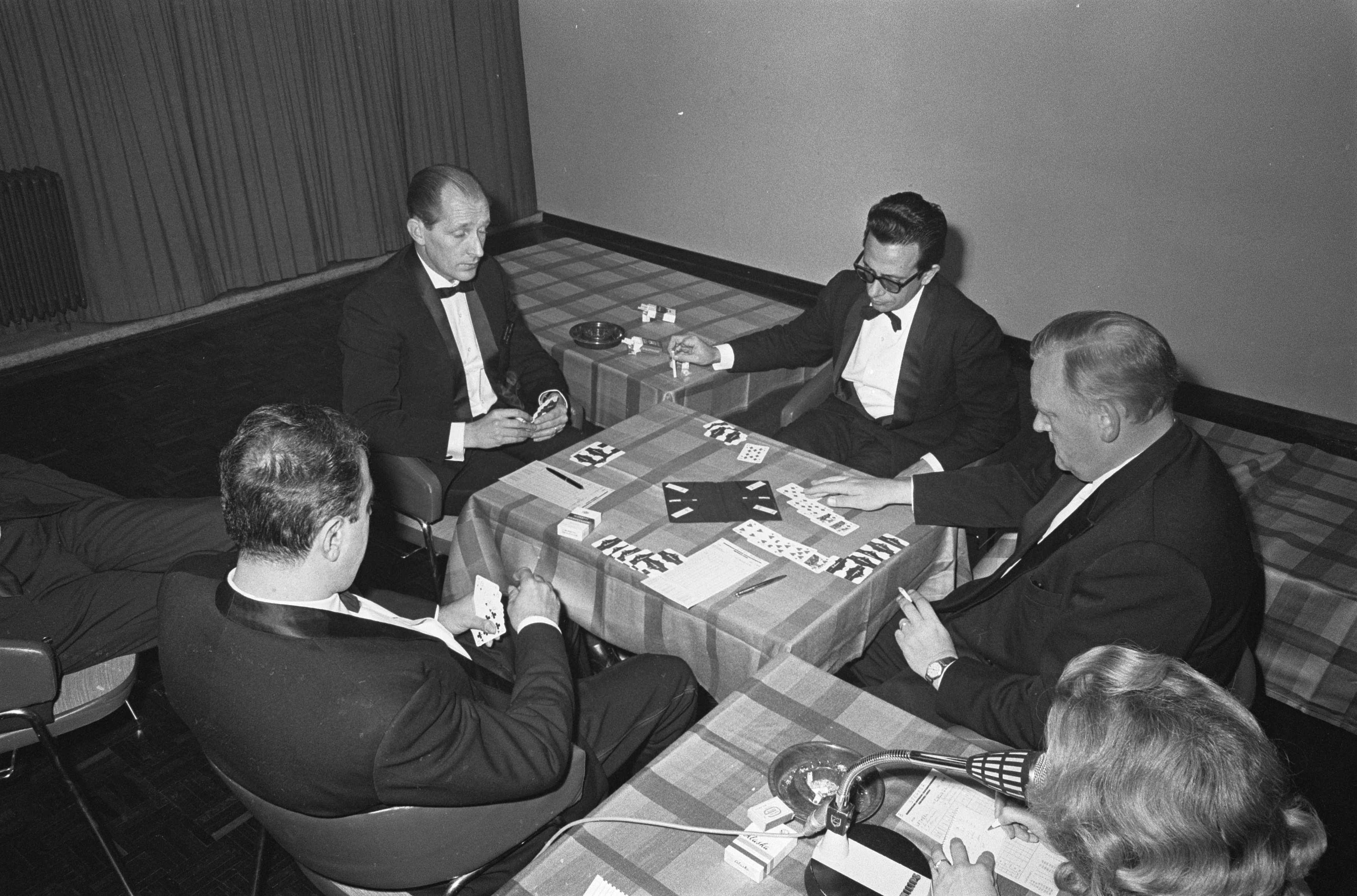 Collectie / Archief : Fotocollectie Anefo Reportage / Serie : [ onbekend ] Beschrijving : Bridge demonstratie van Omar Sharif in RAI, v.l.n.r. Kreijns, Garozzo, Slavenburg en op de rug gezien Belladona Datum : 9 december 1967 Trefwoorden : demonstraties Persoonsnaam : Sharif, Omar Fotograaf : Kroon, Ron / Anefo Auteursrechthebbende : Nationaal Archief Materiaalsoort : Negatief (zwart/wit) Nummer archiefinventaris : bekijk toegang 2.24.01.05 Bestanddeelnummer : 920-9138